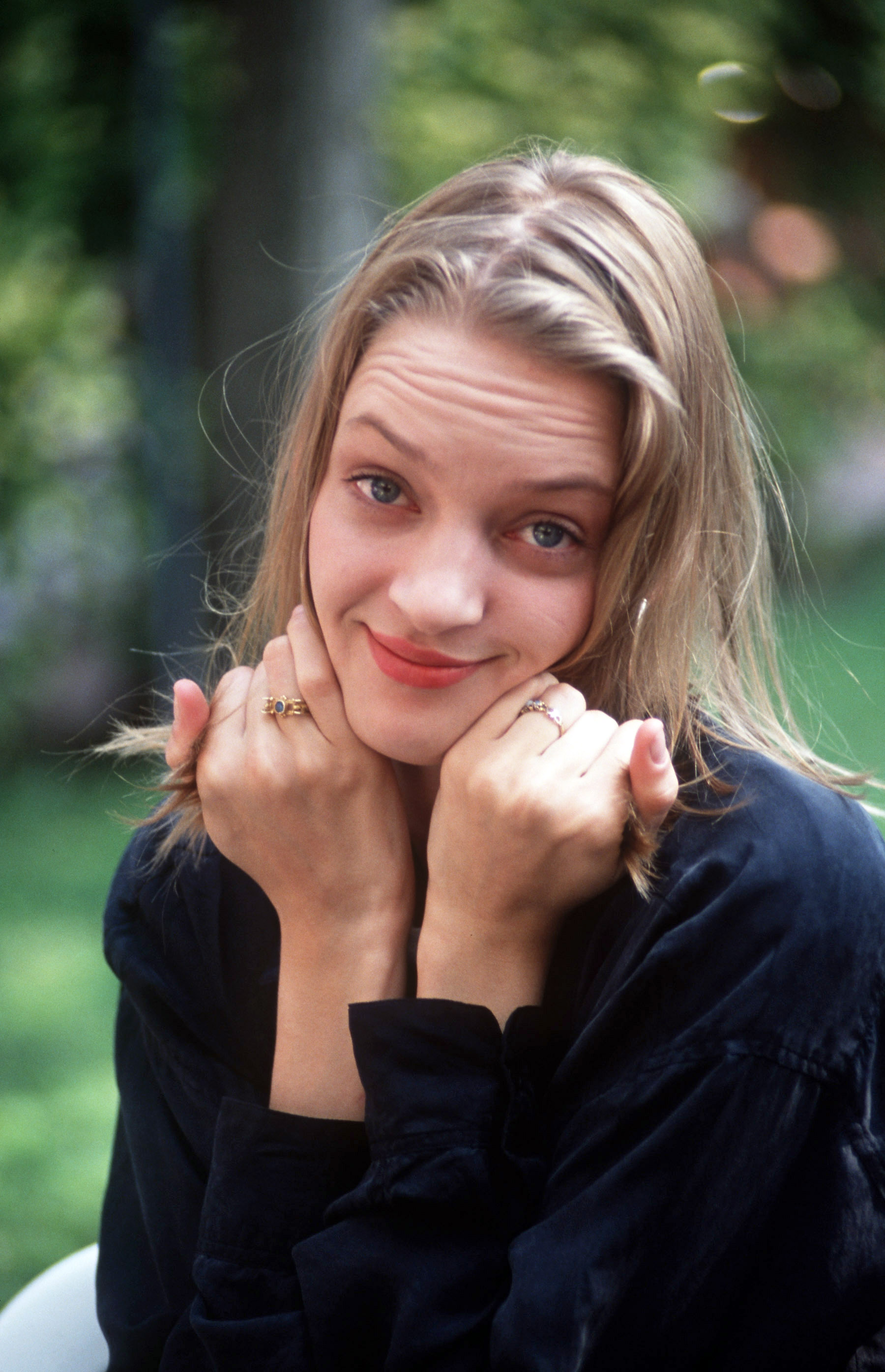 L'attrice Uma Thurman al Festival del cinema di Venezia 1994